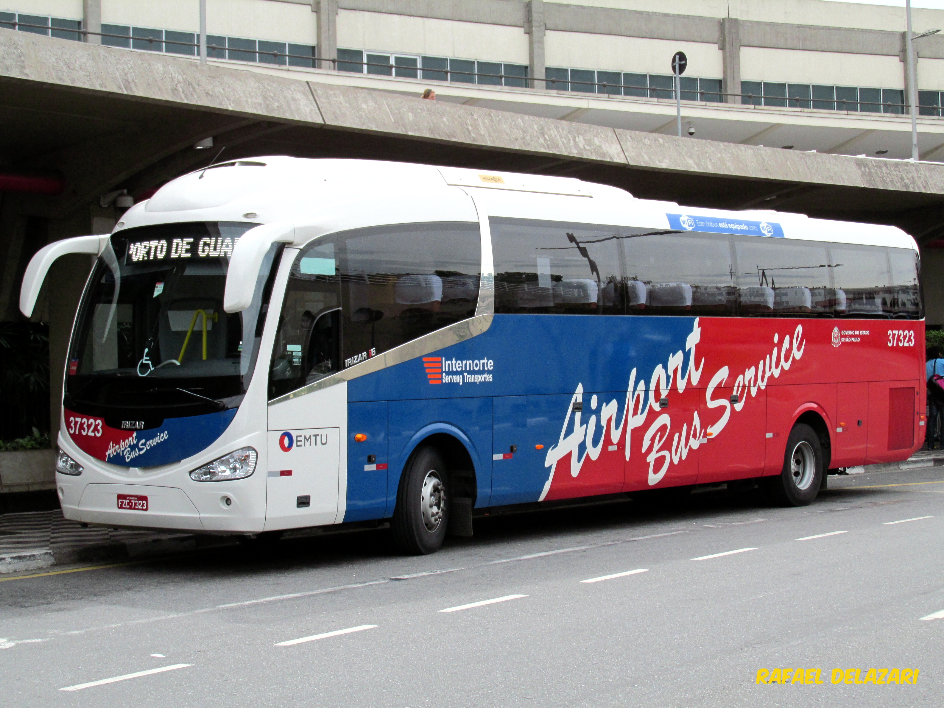 Serveng - 37323